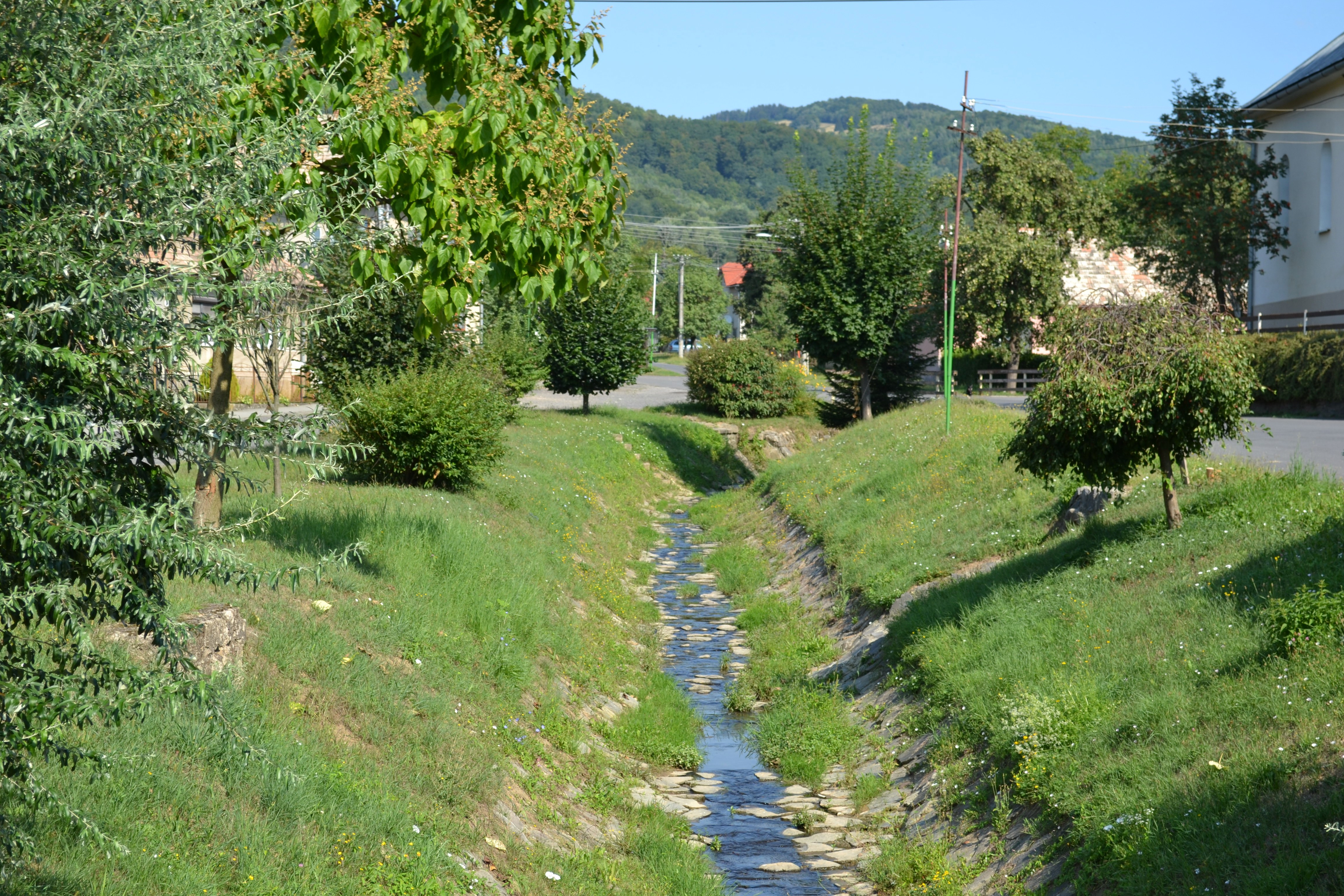 Potok Držkovo pretekajúci obcou Hradište